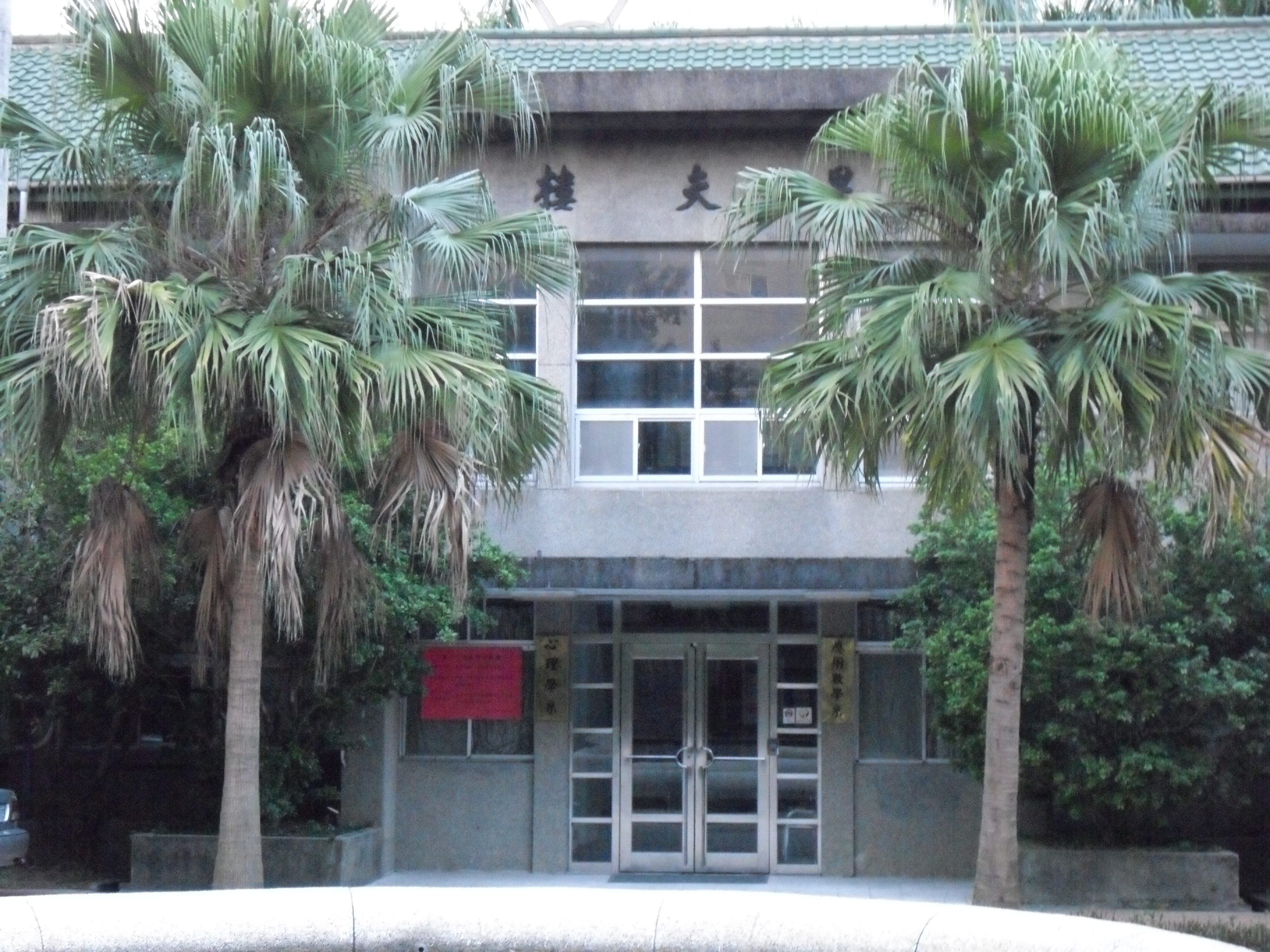 Bân-lâm-gú: 政治大學果夫樓